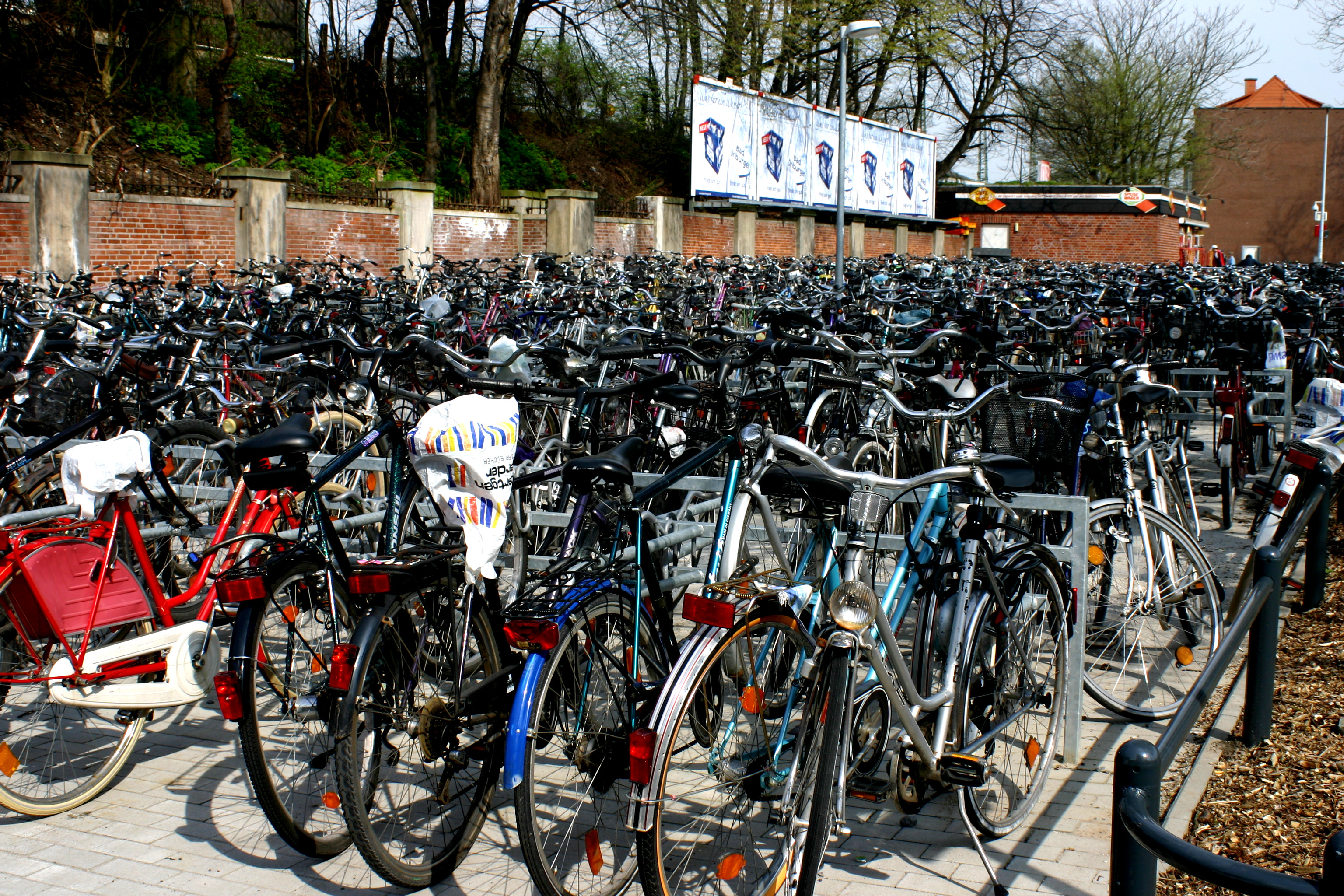 Fahrradabstellplatz am Hauptbahnhof in Münster